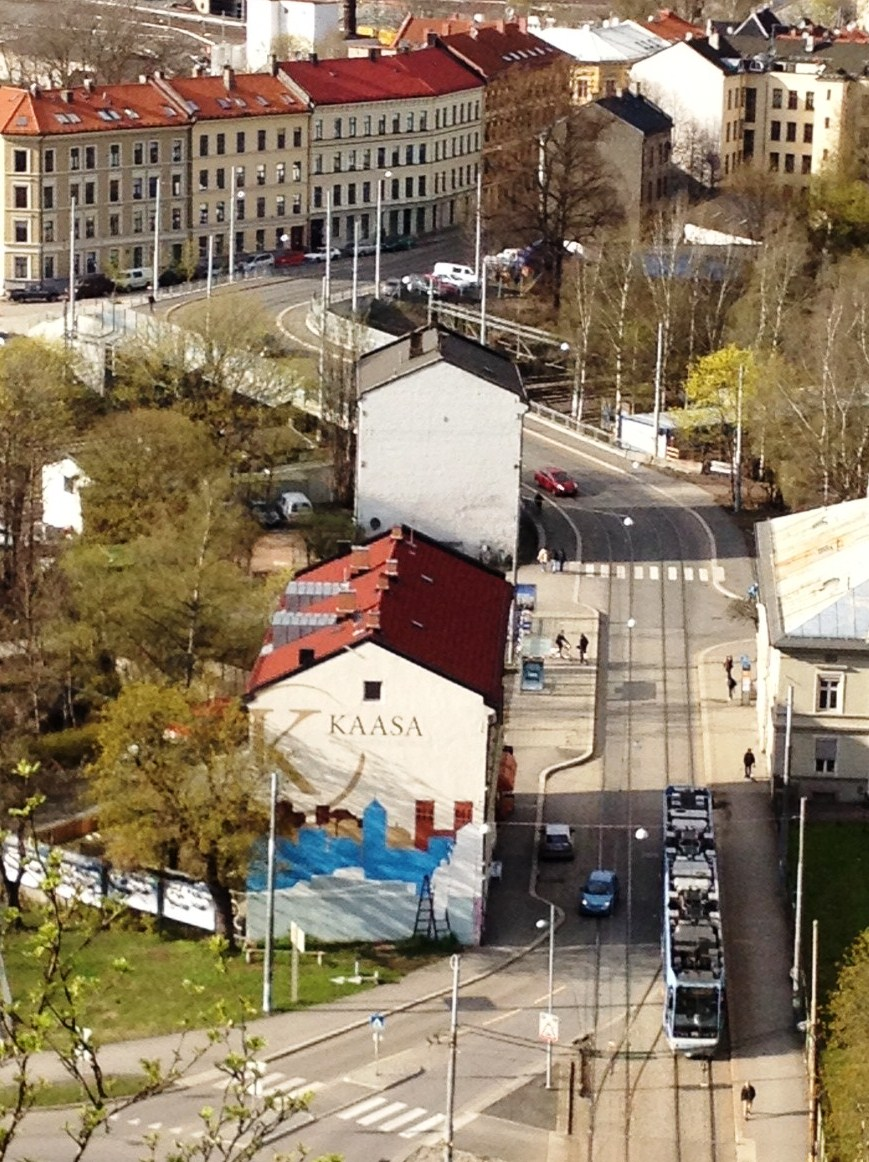 Ekebergbanens trase fra Ekeberg til gamlebyen, over Geitabru.